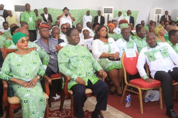 Henri Konan Bédié et les militants réunis à Abidjan pour fêter les 73 ans du PDCI, en Côte d'Ivoire, le 9 avril 2019. (VOA/George Ibrahim Tounkara)